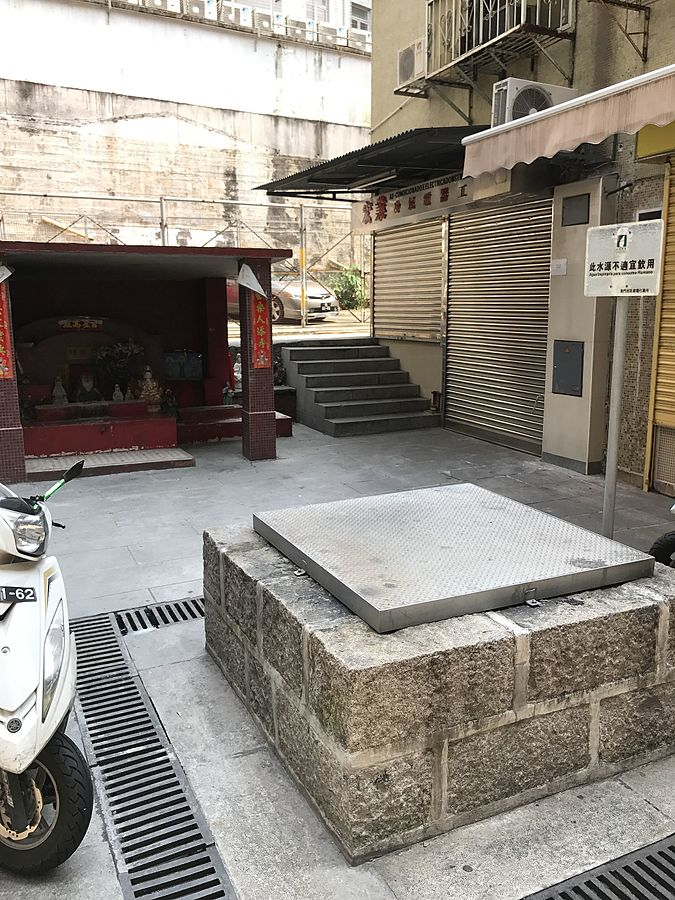 中文（台灣）: 涼水街的古水井